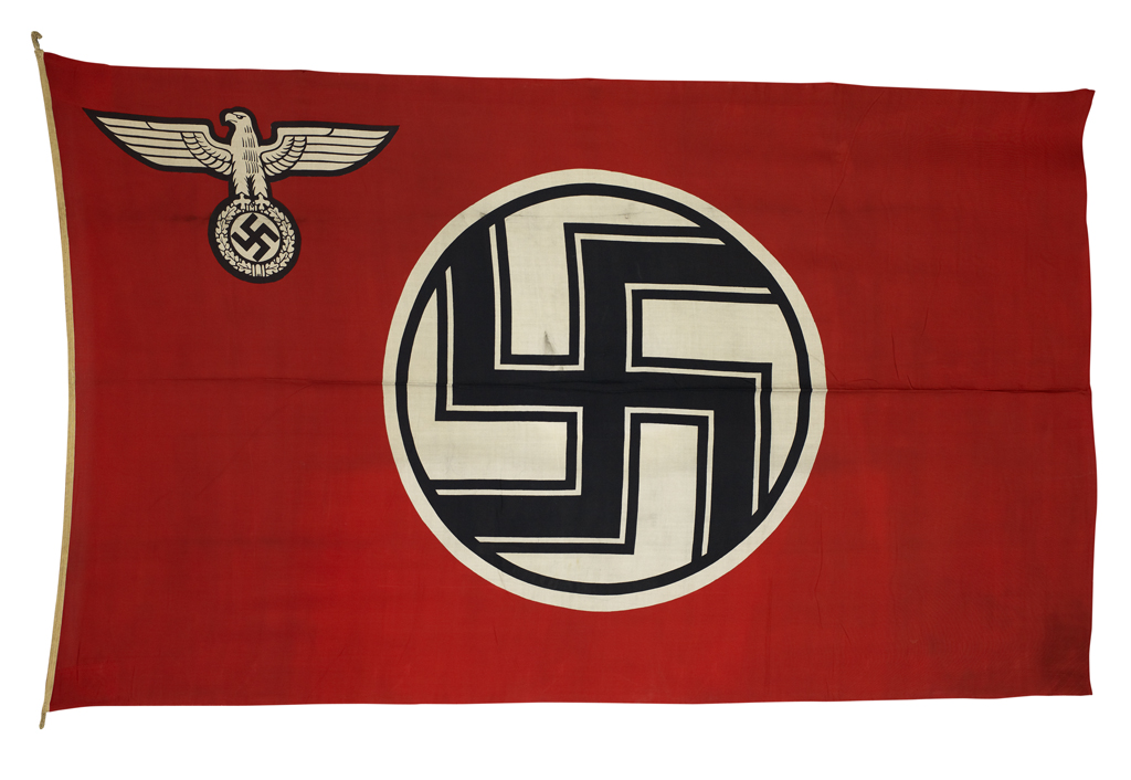 Ce drapeau est réalisé dans une seule pièce d’étoffe rouge de forme rectangulaire. Il représente recto verso une croix gammée noire inscrite dans un disque central écru. La partie supérieure gauche du drapeau est occupée par une petite croix gammée placée dans une couronne de lauriers surmontée par un aigle.